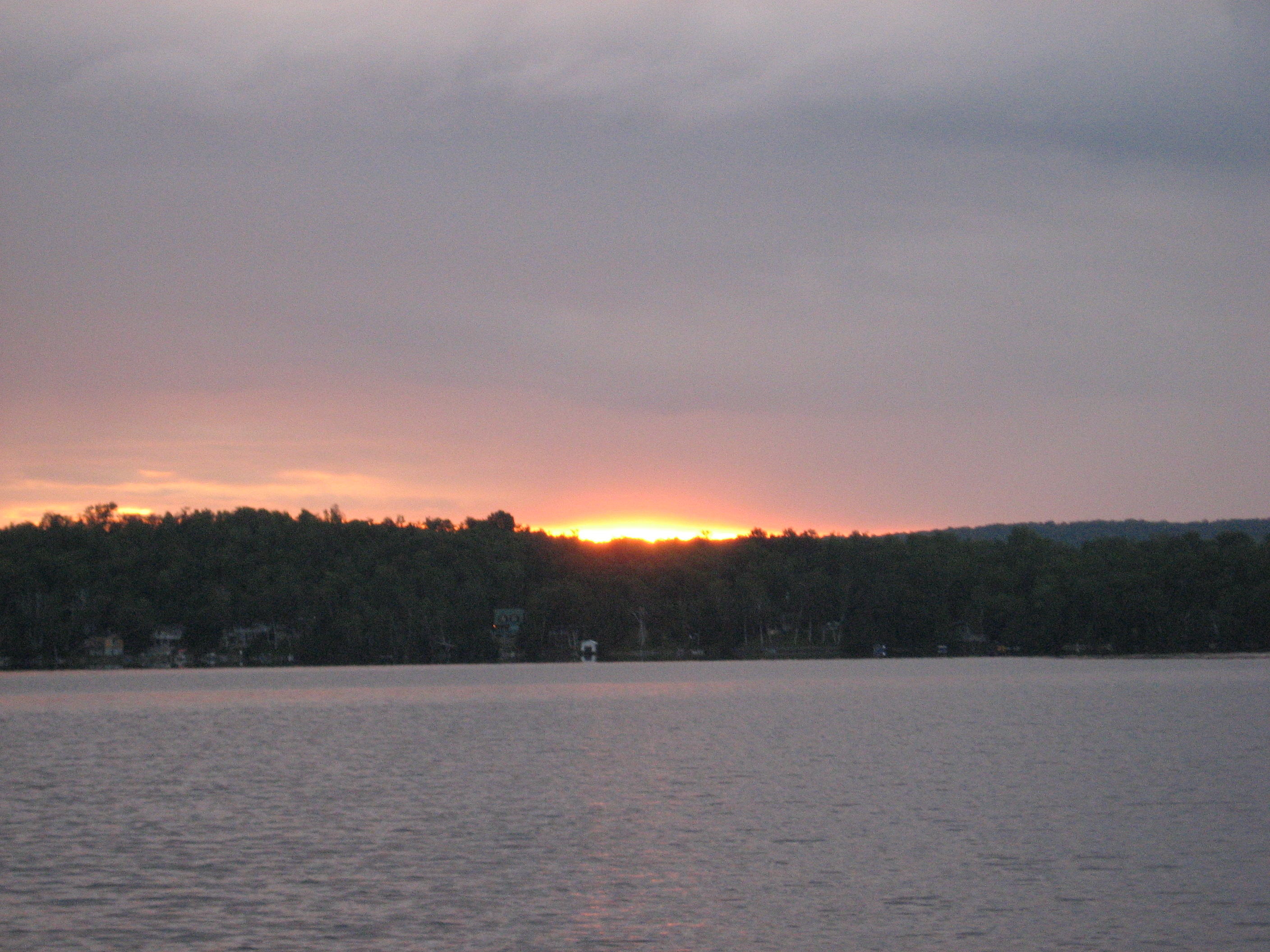 Une partie du lac Marie-Louise, situé à La Minerve.